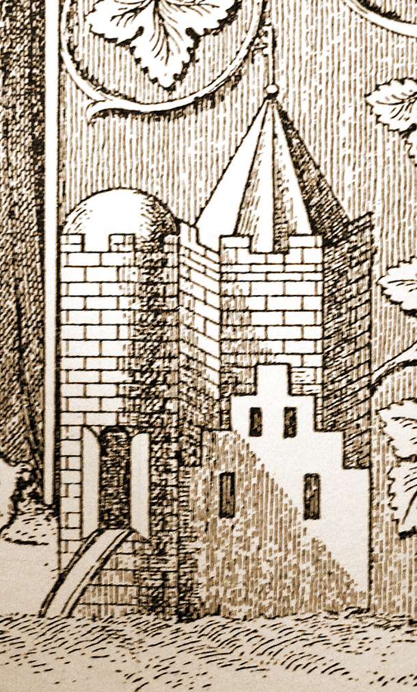 Burg Woldenstein auf der Grabplatte Bischof Heinrichs III. von Hildesheim (1363)